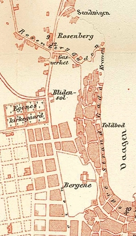 Kart over Stavanger, 1889